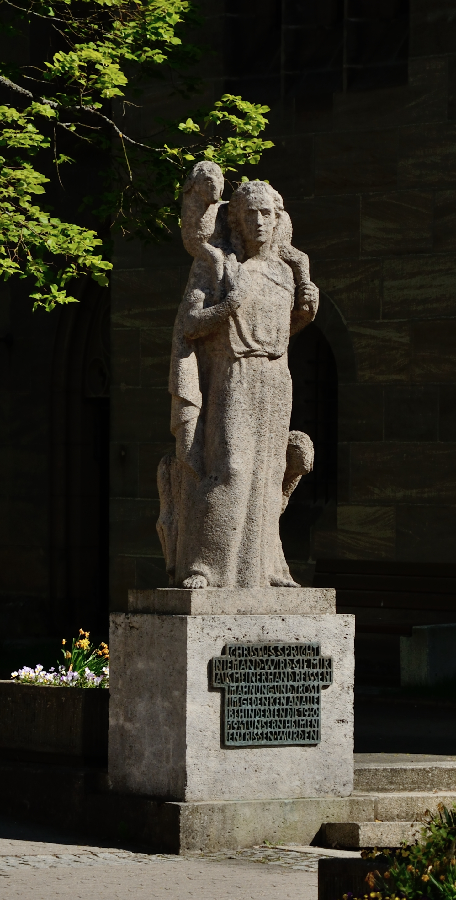 Der gute Hirte, St. Laurentius Neuendettelsau